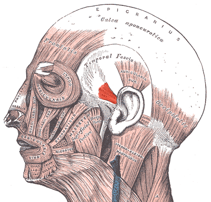 Auricularis anterior muscle